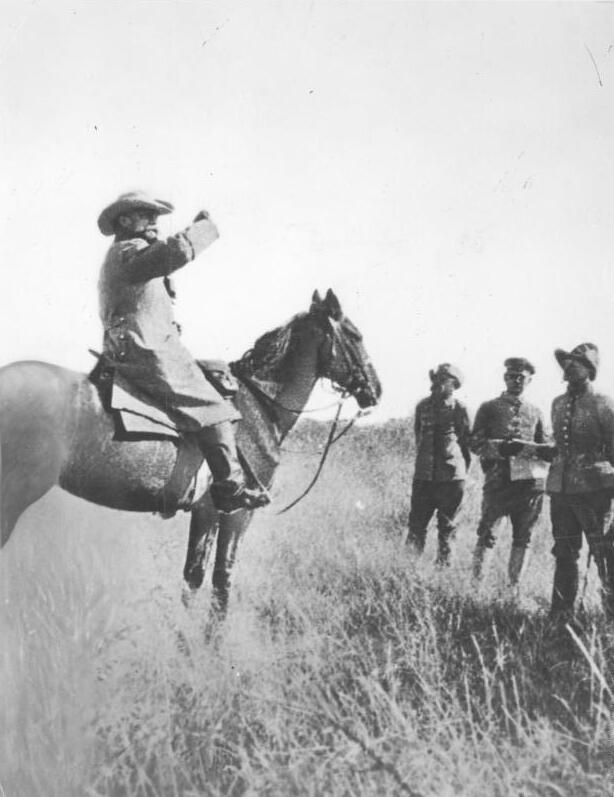 Zentralbild Die Kämpfe in Deutsch-Südwestafrika 1904-1906 Oberstleutnant von Estorff (zu Pferde), einer der Führer der Deutschen Schutztruppe in den Kämpfen gegen Herero und Hottentotten, bei einer Besprechung mit seinen Offizieren. (Mit Mütze Hauptmann Franz Epp, der spätere Reichsstatthalten in Bayern)